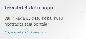 LV_box